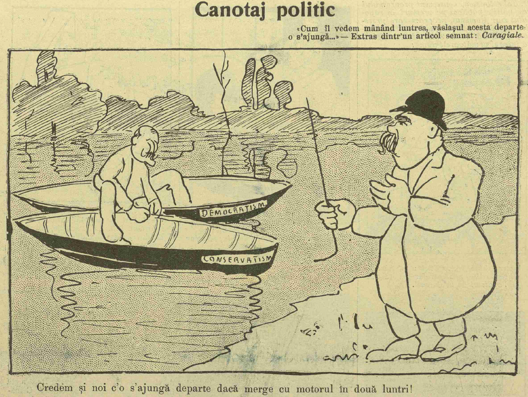 Caricatură din revista Furnica, nr. anul IV, nr 179, joi 14 februarie 1908, pagina 8